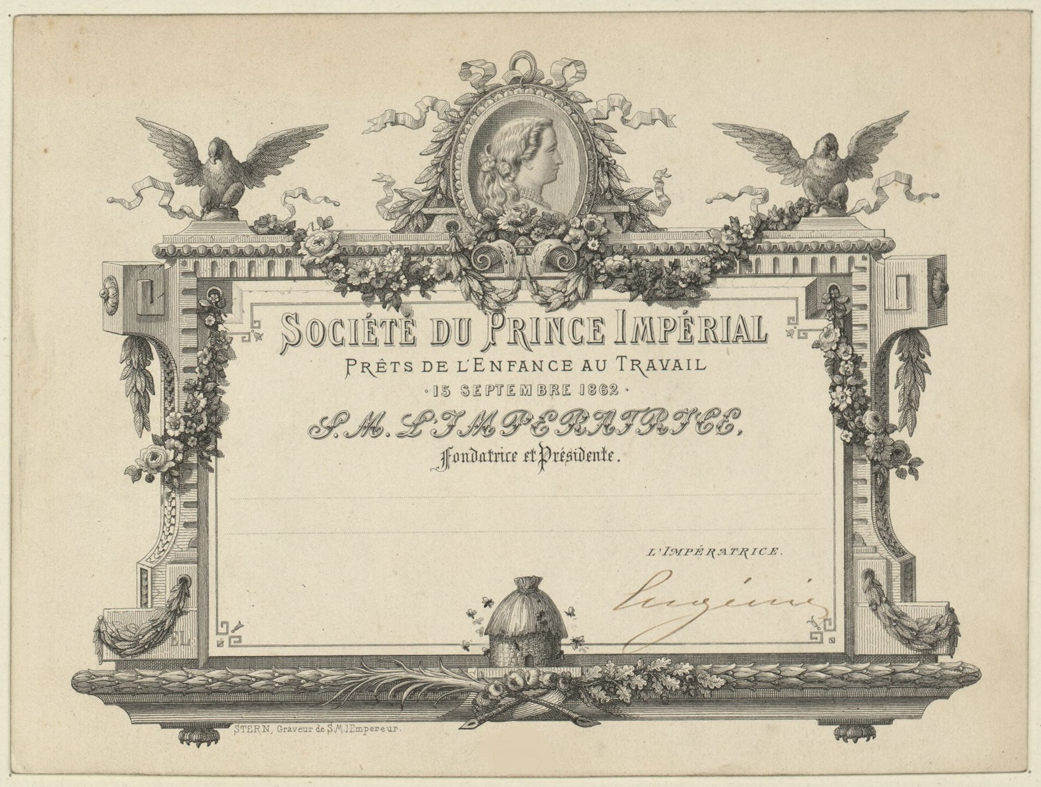 Diplôme de fondateur de la Société du prince impérial, 15 septembre 1862. En haut figure un portrait de l'impératrice Eugénie. En bas figurent des abeilles, symbole héraldique napoléonien.